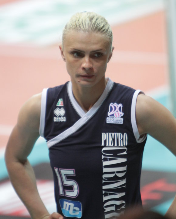 Vesna Čitaković, pallavolista serba, gioca nel ruolo di centrale